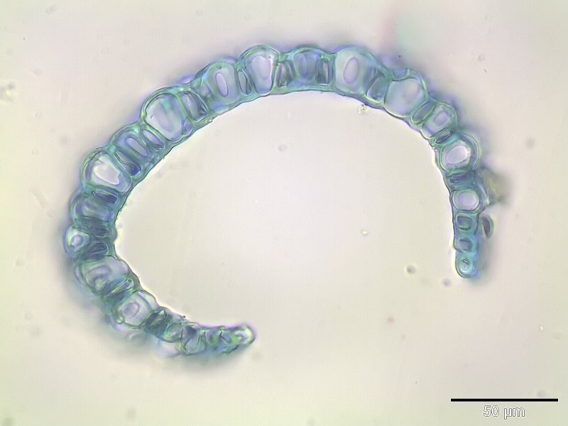 Sphagnum subnitens, Astblatt Querschnitt, 400x